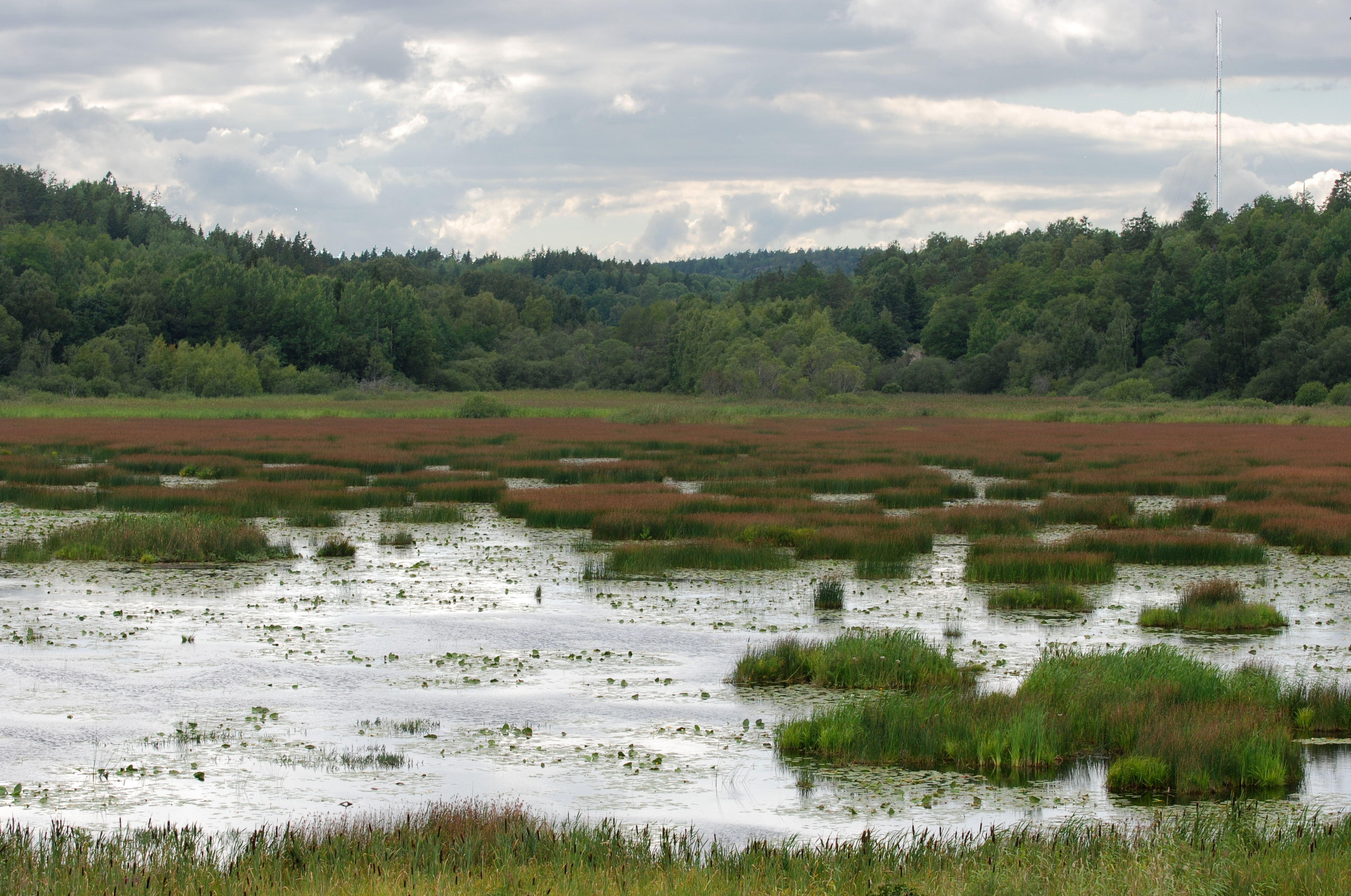 Lissmasjön